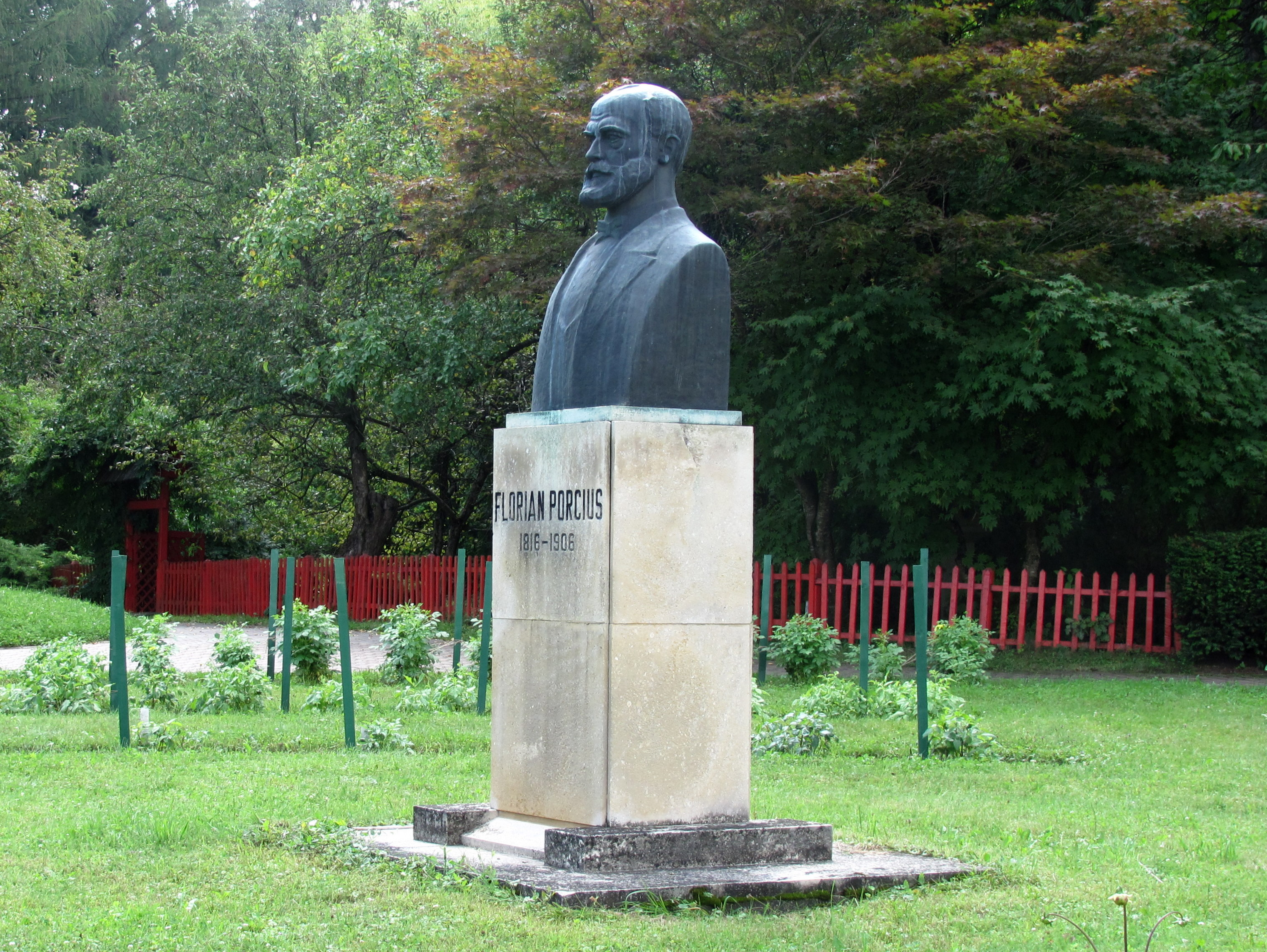 Bustul lui Florian Porcius situat in Grădina Botanică "Alexandru Borza"